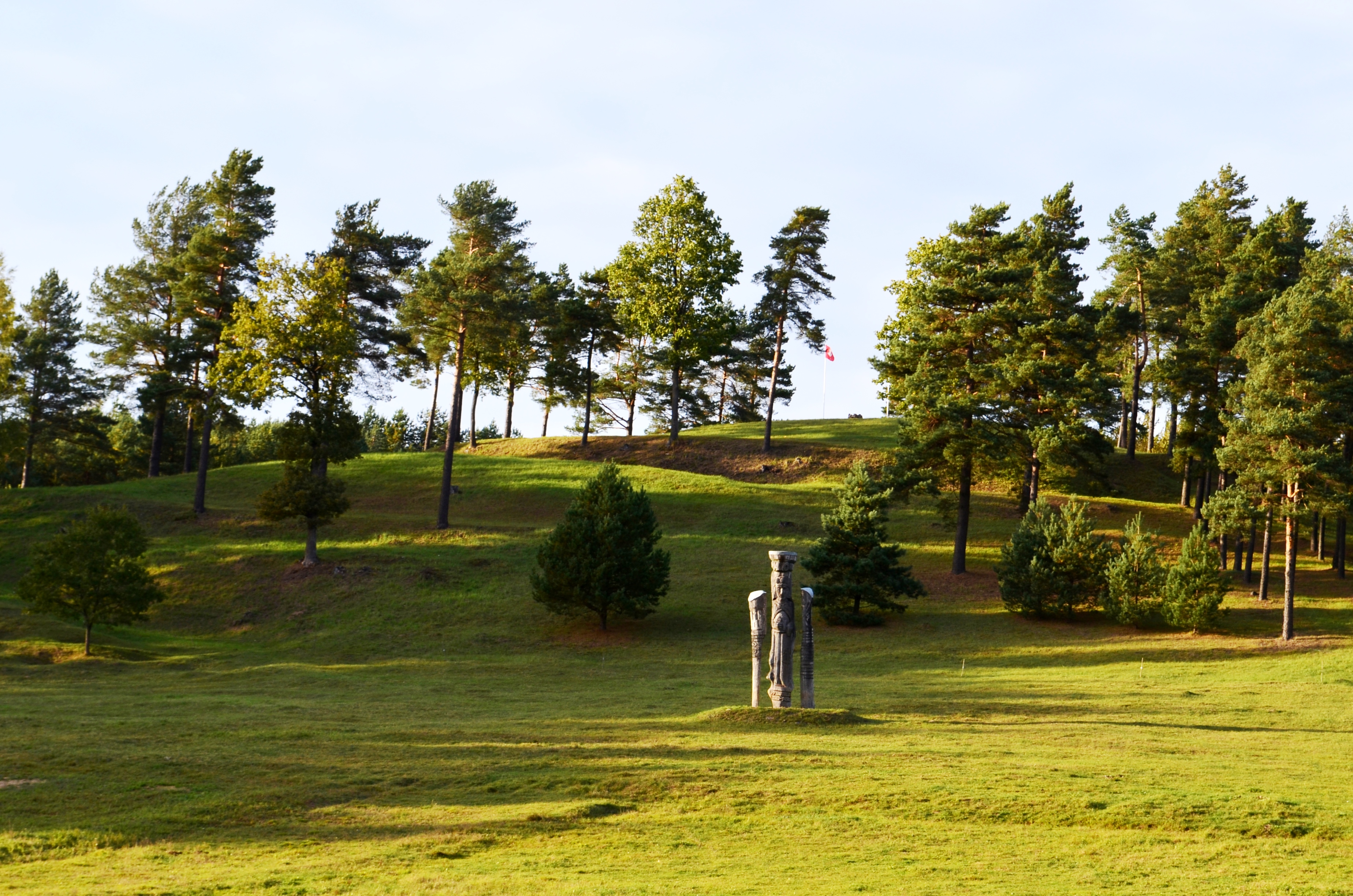 Kepaluškalnis (Kaltinėnų plk.), Šilalės raj.